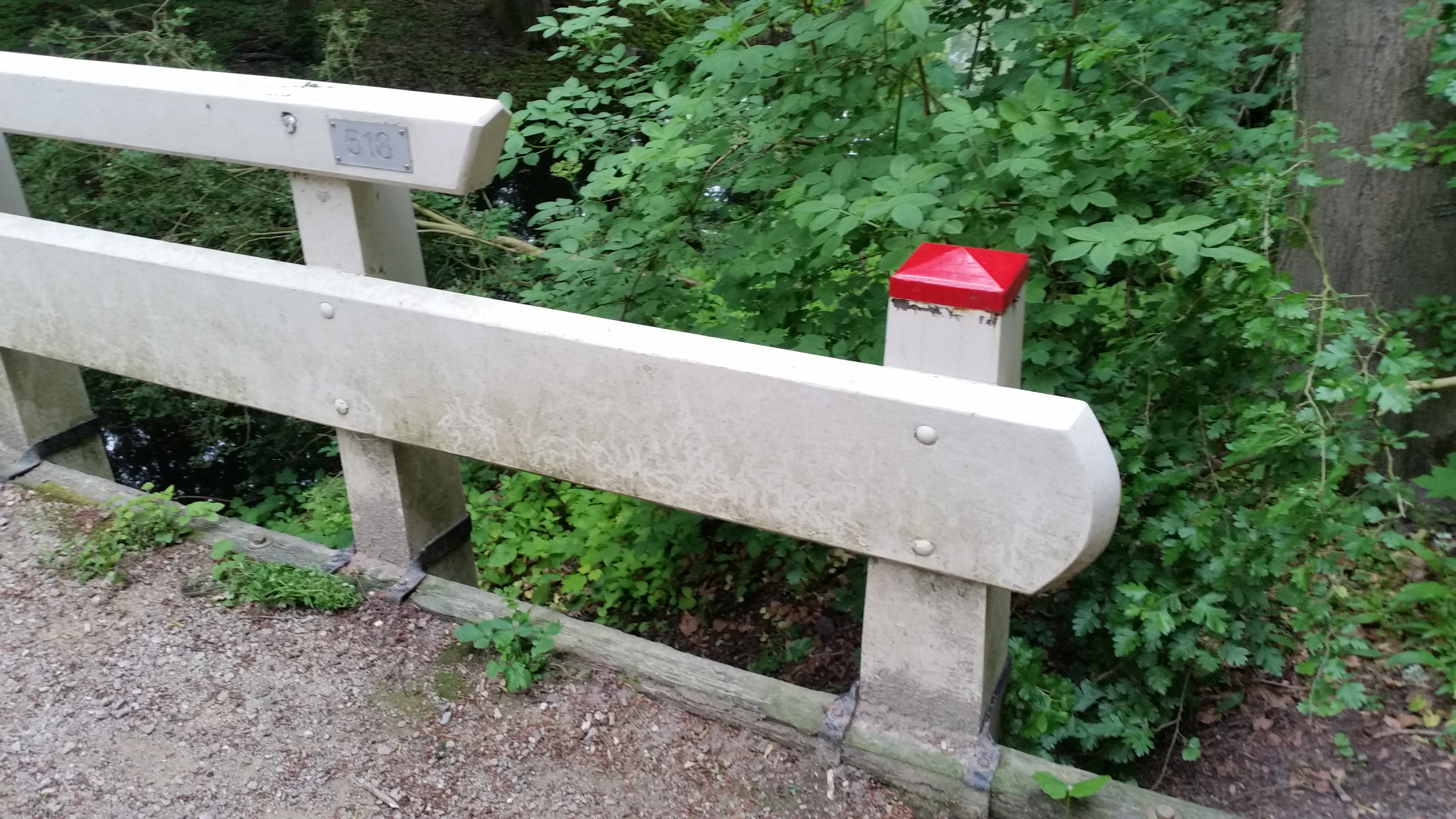 Leuning van Brug 518 (in Amsterdam)